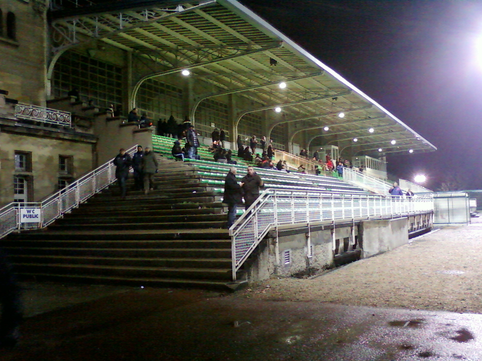 Tribune principale du stade Marville de La Courneuve à l'occasion du match UJA Alfortville-AS Beauvais Oise du 22 janvier 2011